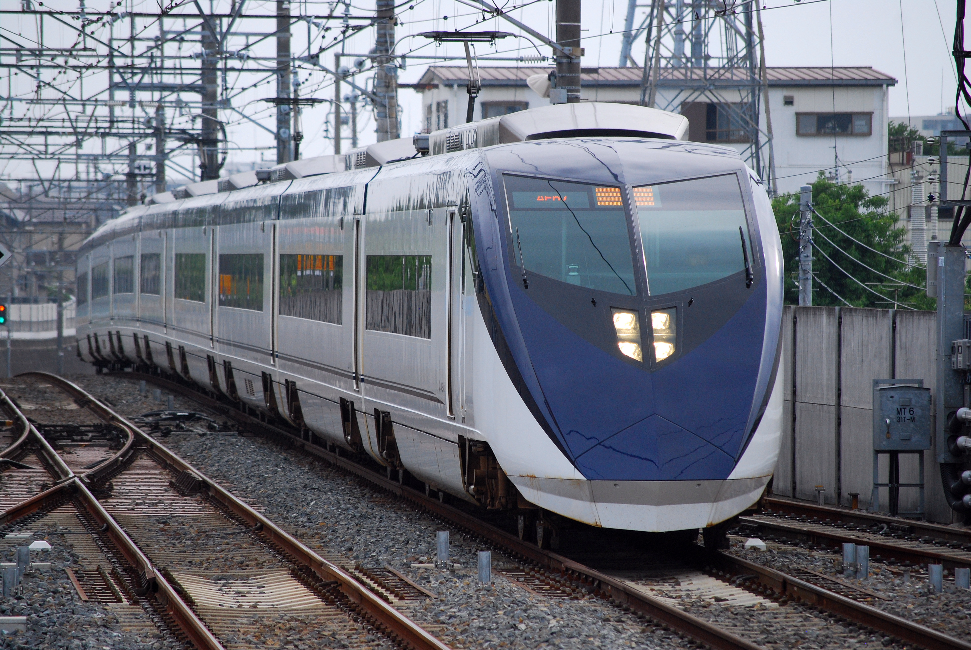 北総線を走行する新型スカイライナー（2代目）